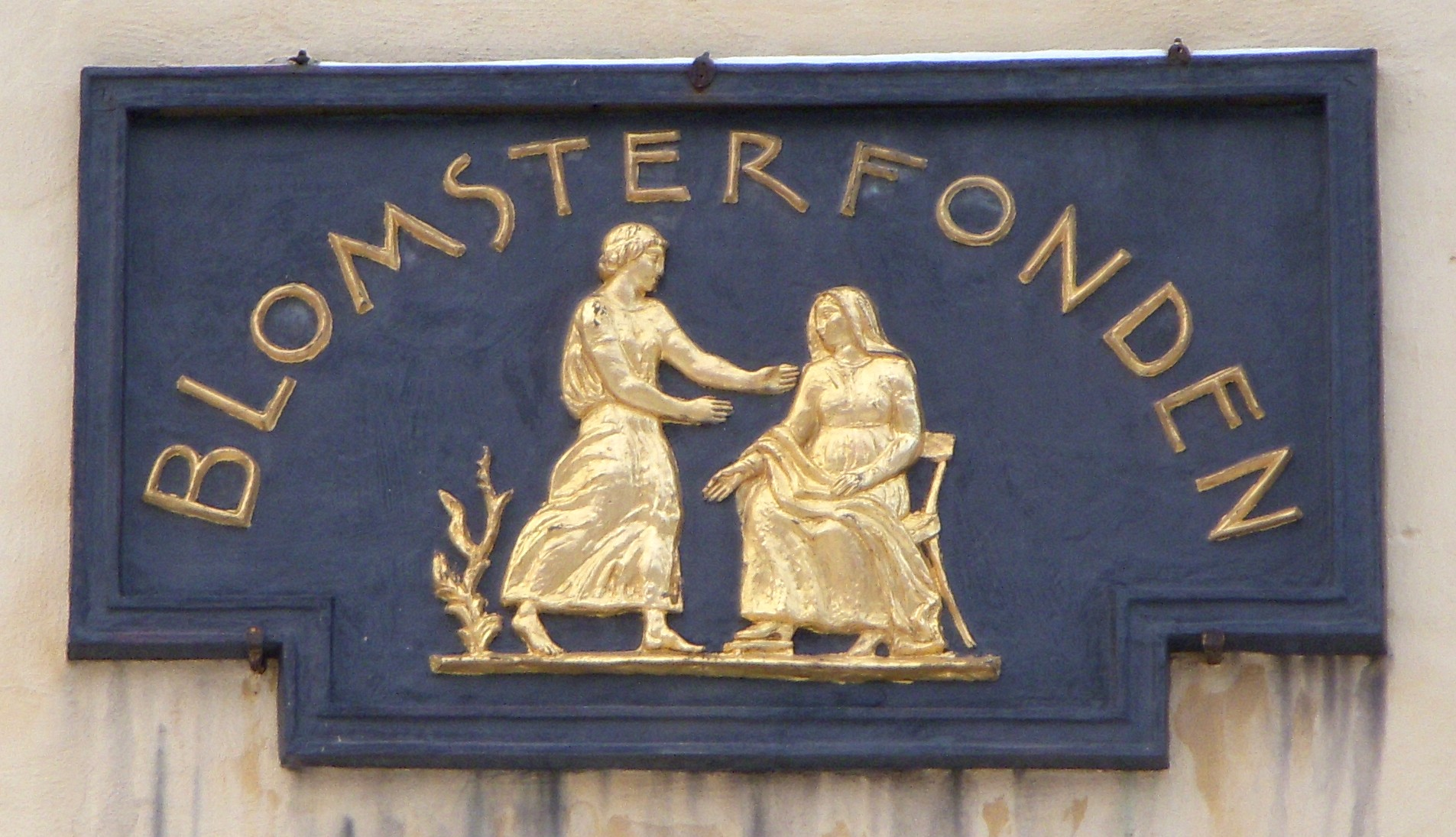 Blomsterfondens skylt på fastigheten i Röda bergen